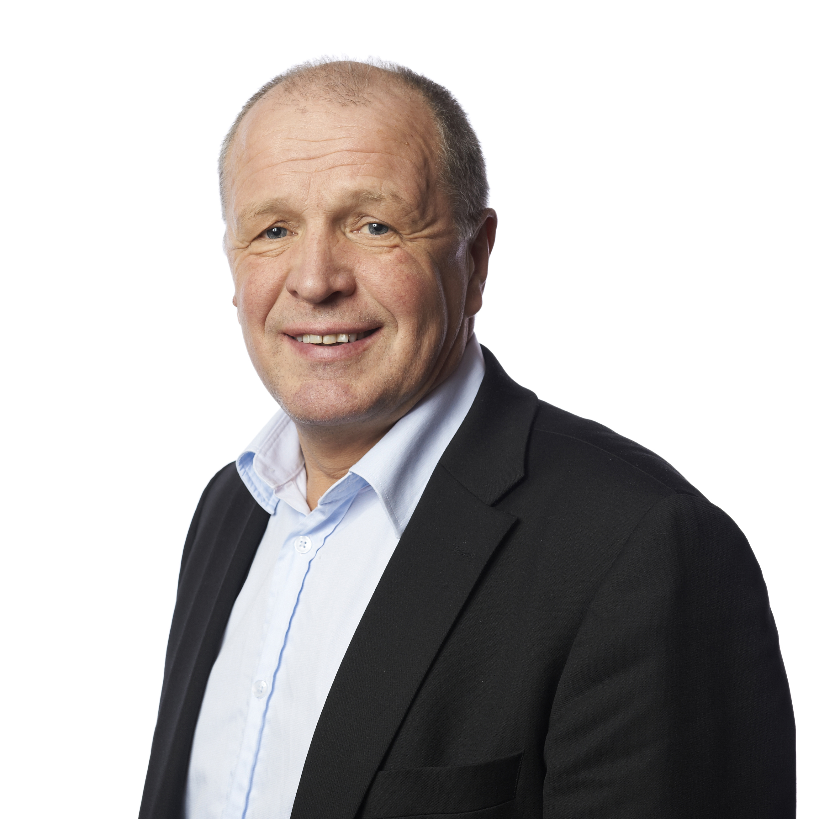 Atle Kvåle, Arbeiderpartiet , Samferdselsutvalet